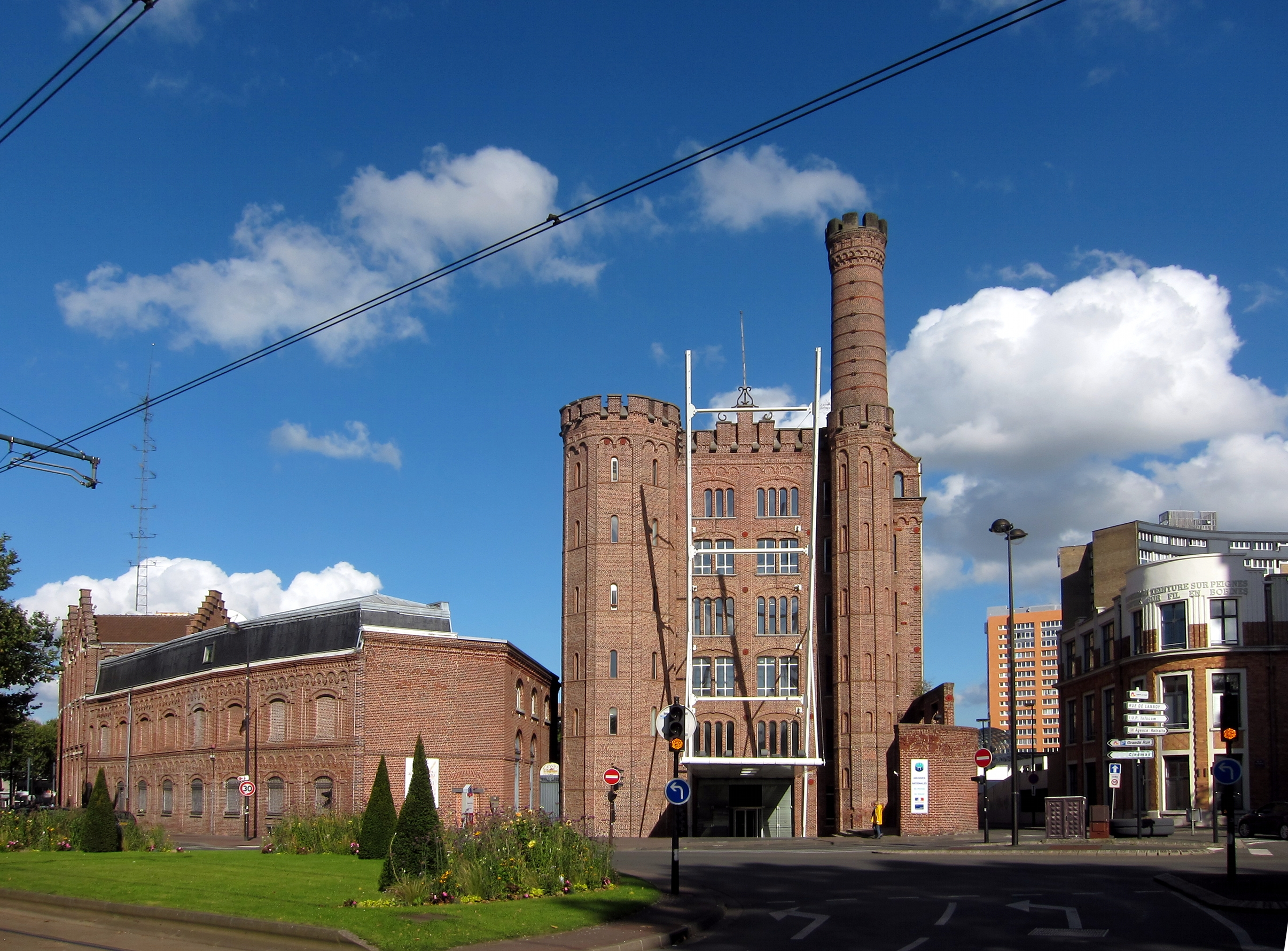 Le centre des archives du monde du travail de Roubaix dans l'ancienne usine Motte-Bossut.